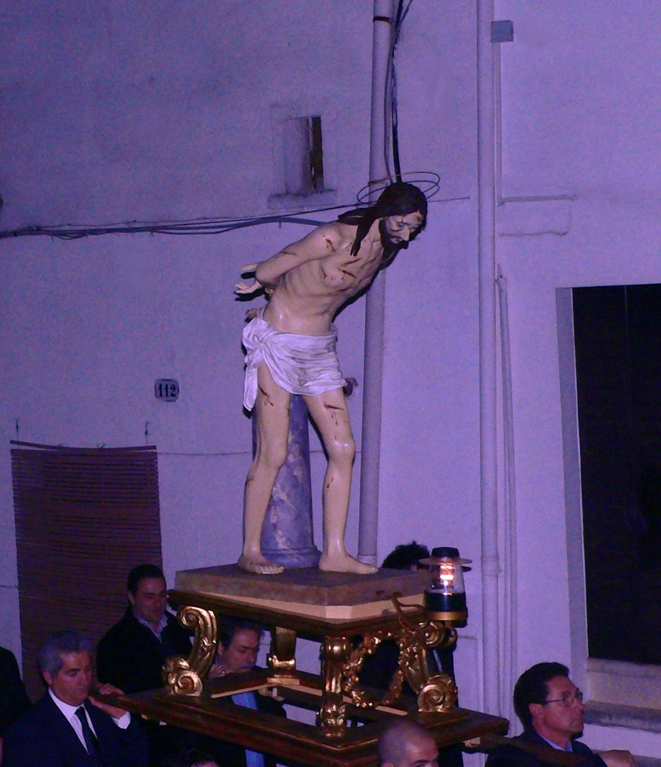 Statua del Cristo alla colonna portata in processione a Ceglie Messapica in occasione della processione dei Misteri.